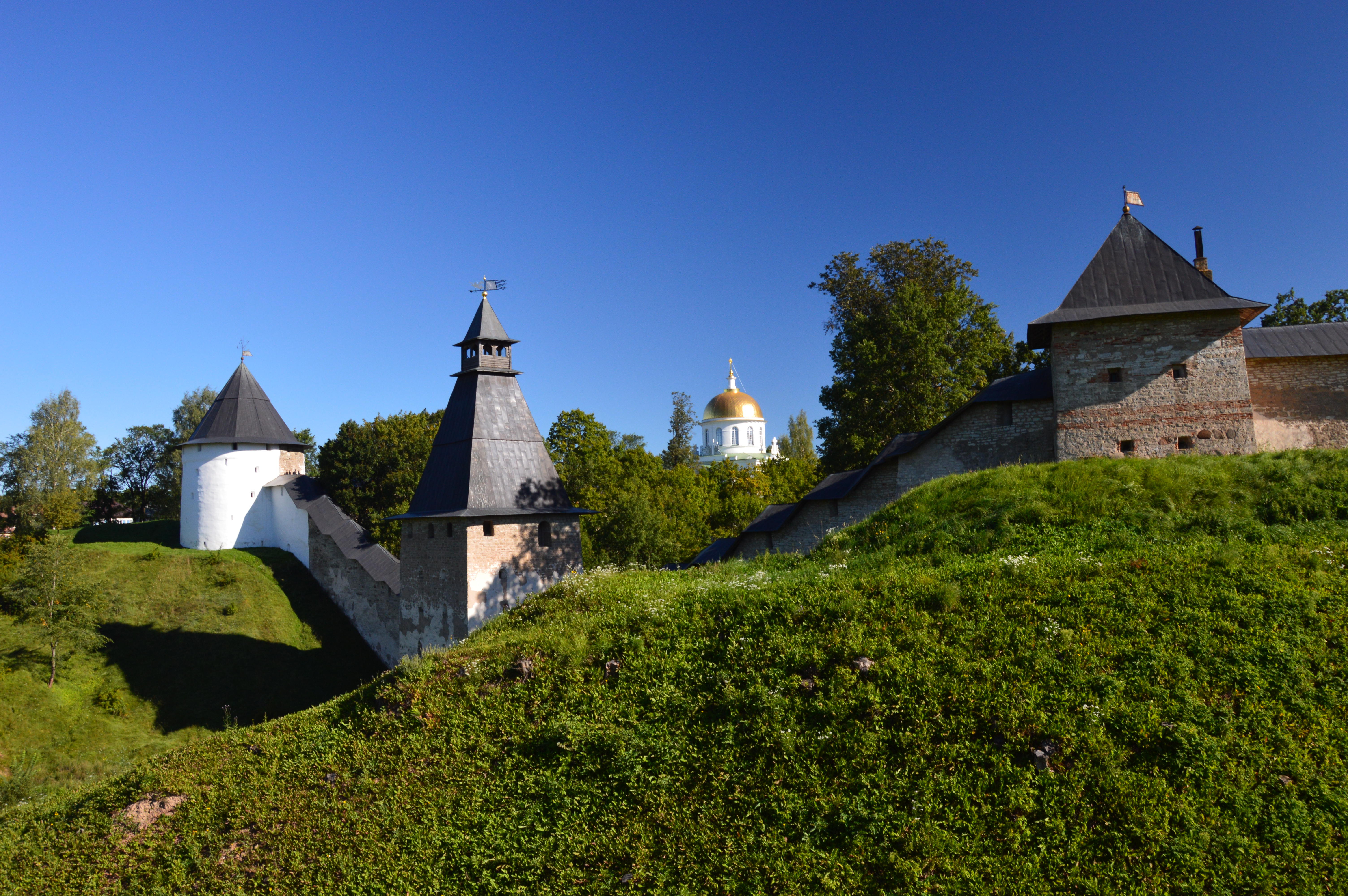 Petseri klooster maarjapäeval.